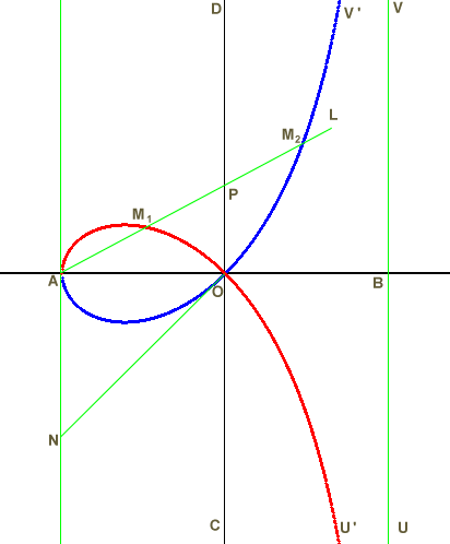 СтрофоидаПрямая строфоида